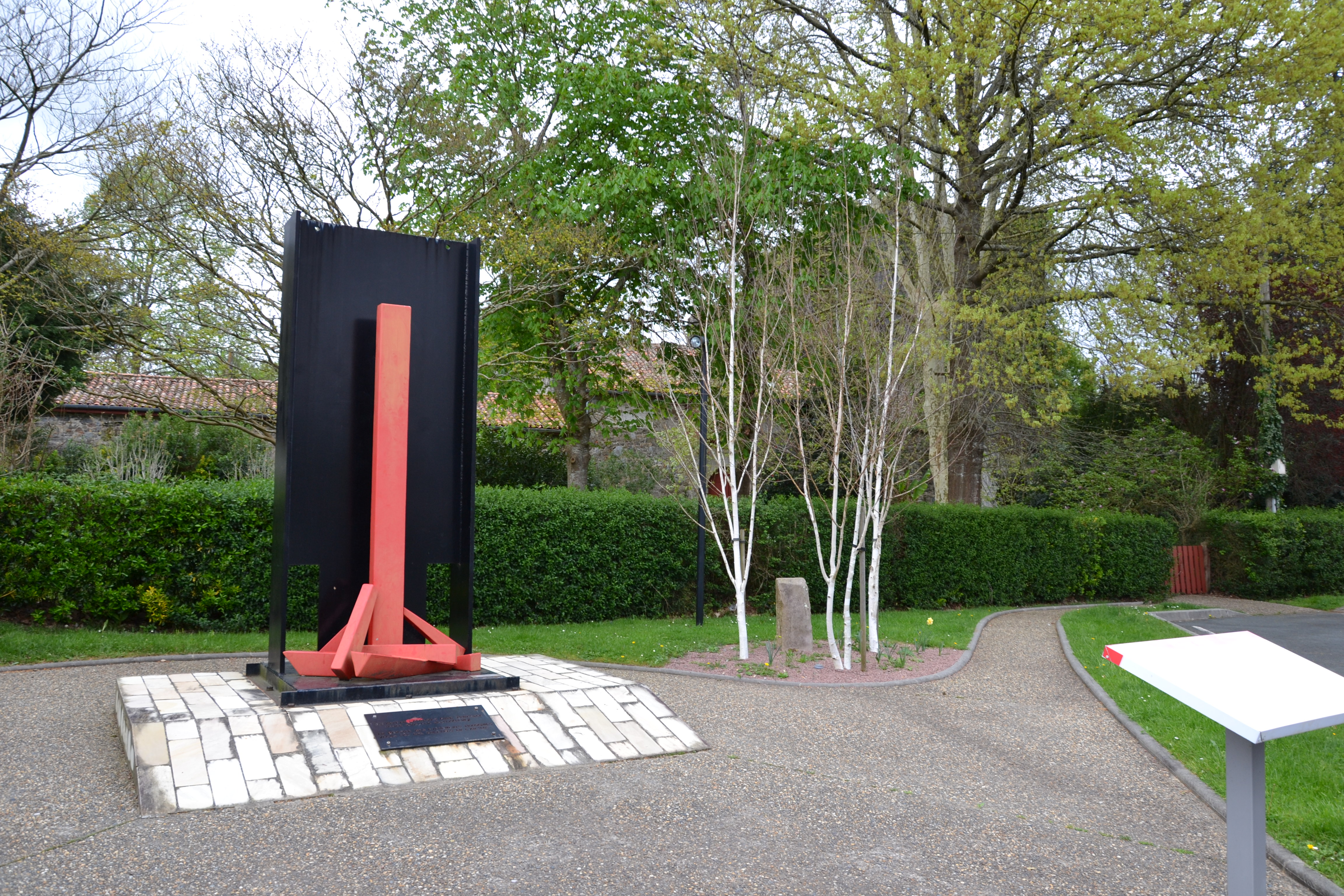 sculpture "Le procès des sorcières à Saint-Pée-sur-Nivelle et au Labourd en 1609"